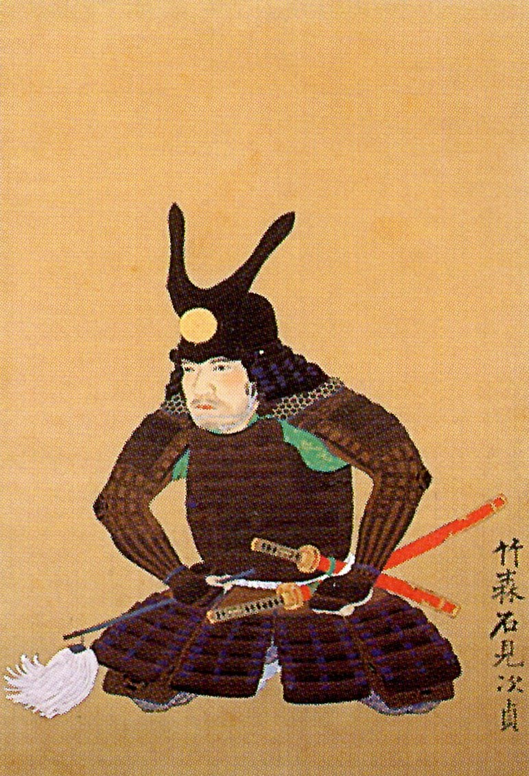 竹森次貞の肖像。